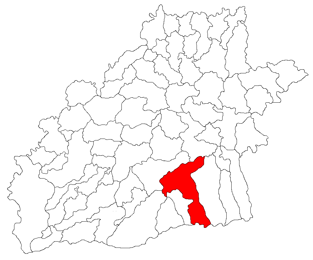 Categorie:Hărţi ale judeţului Sibiu Licensing Categorie:Imagini din Transilvania